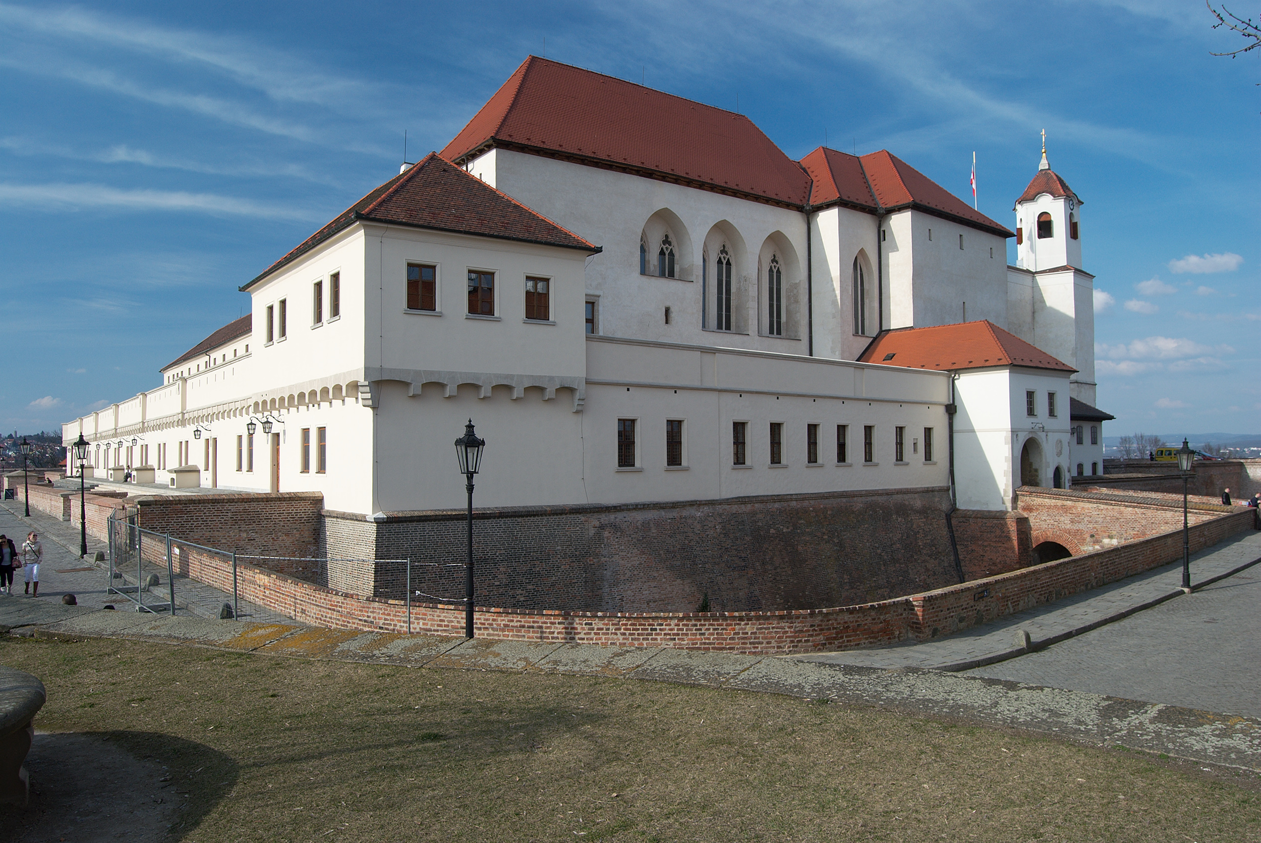 Město Brno - hrad Špilberk